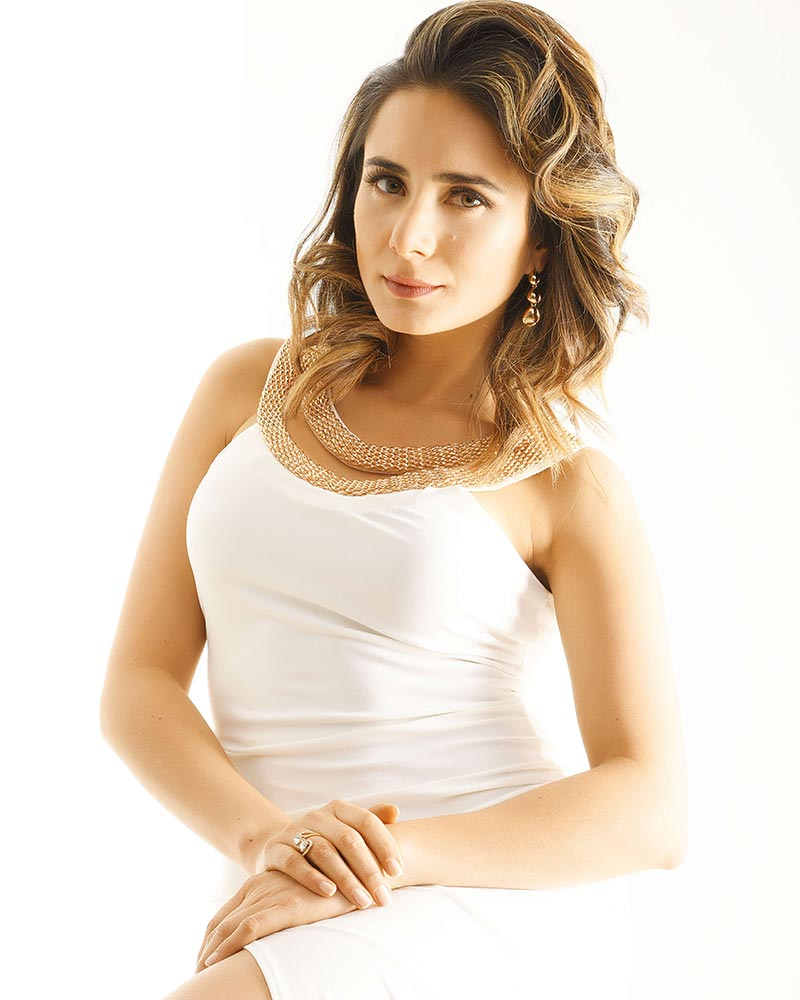 Johanna Fadul